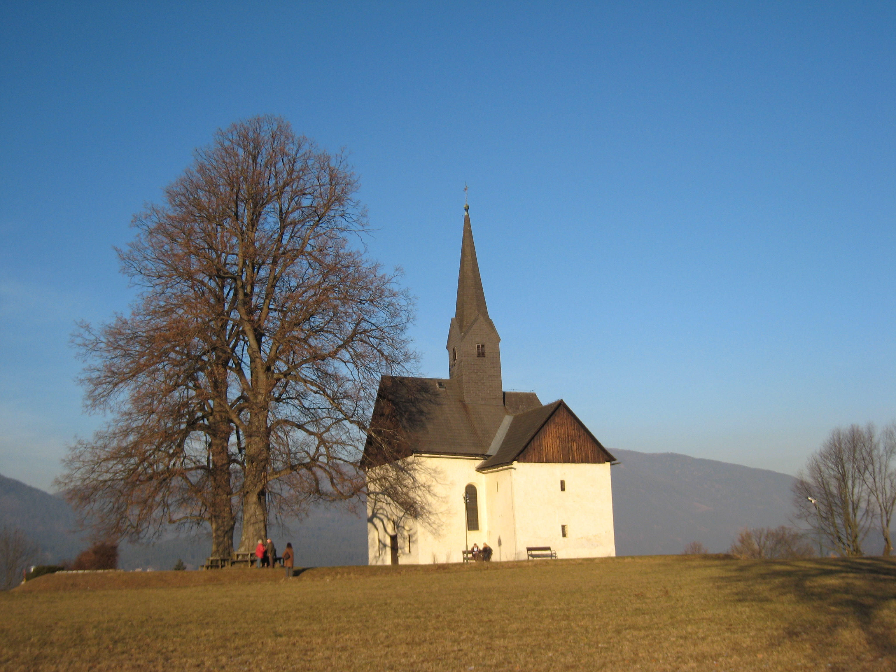 Filialkirche Sankt Johann, Villach